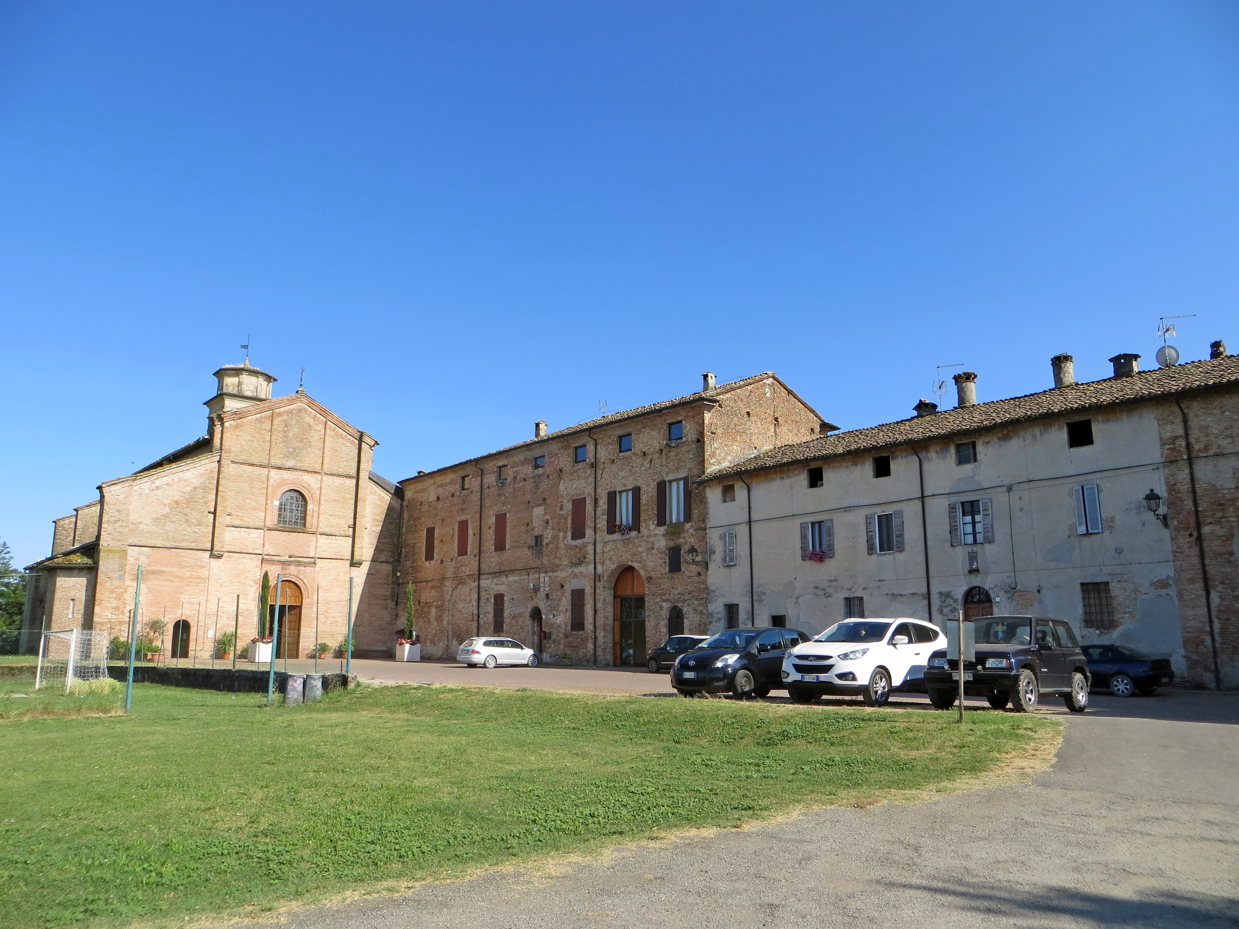 Monastero di Santa Maria Assunta (Castione Marchesi, Fidenza) - chiesa ed edifici annessi